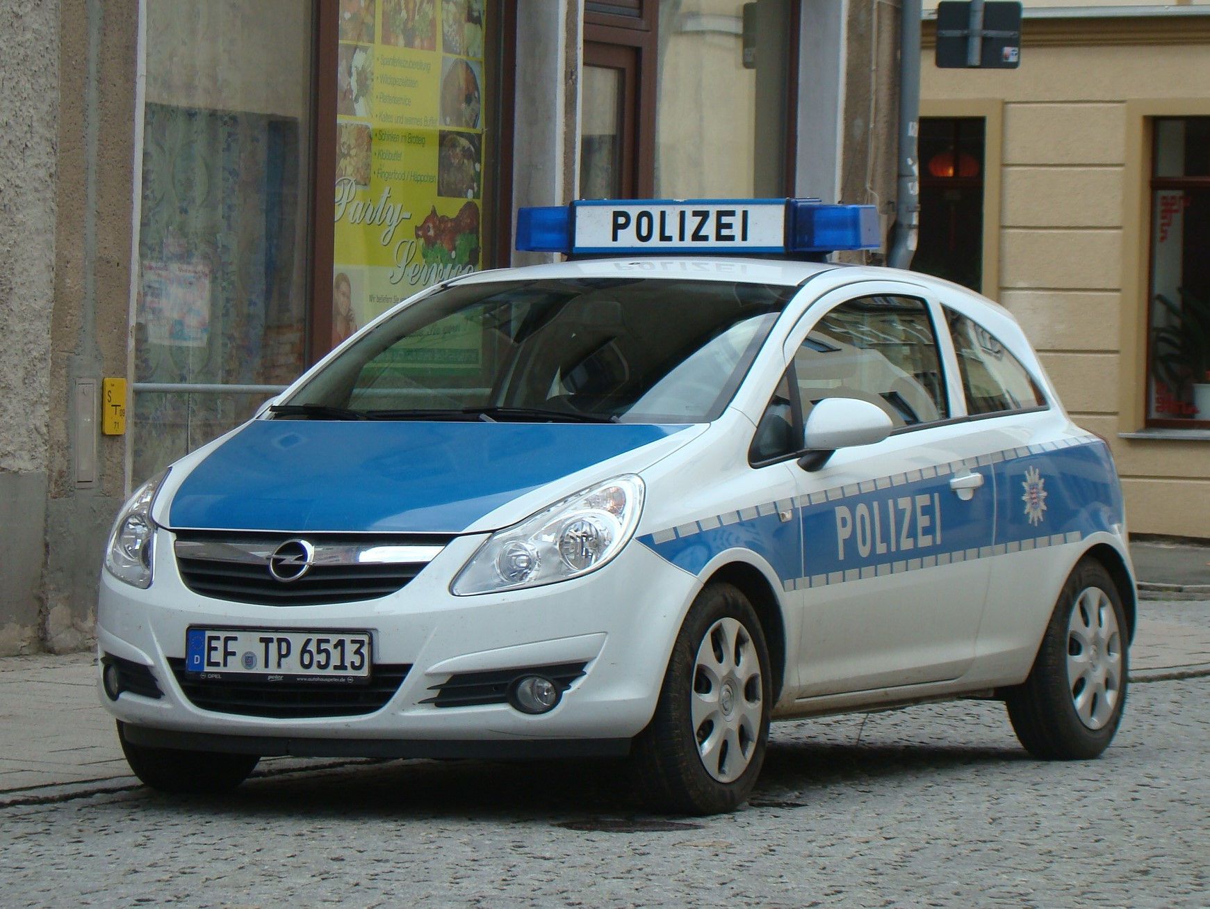 Neustadt an der Orla, Polizeifahrzeug